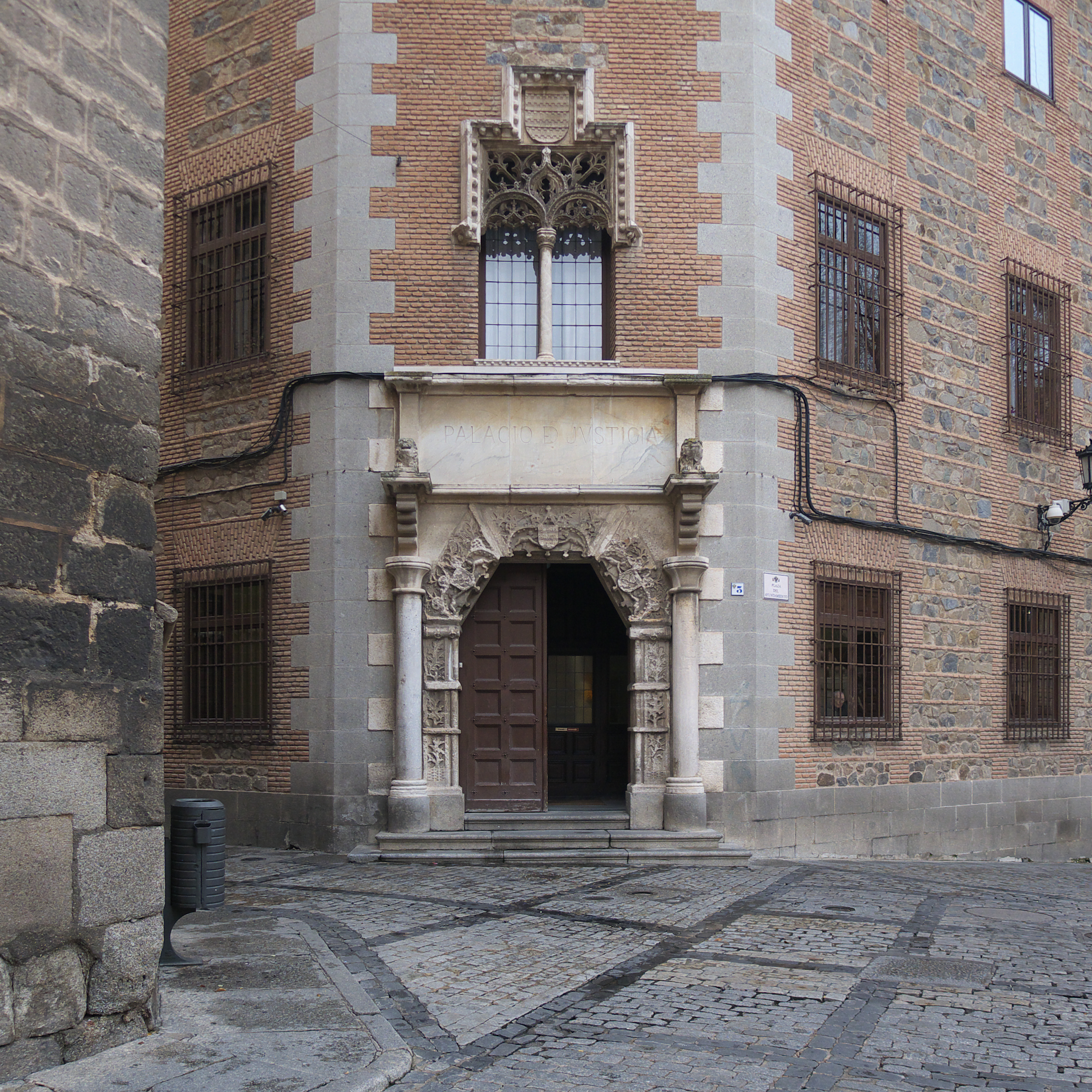 Antigua Audiencia de Toledo. En el año 1855 es desamortizada la Casa del Deán de la Catedral, edificio que se destinará a los juzgados de la ciudad. En el mismo, se recupera una valiosa portada, proveniente del palacio de los Peromoro (o de Ayala), y ventana.